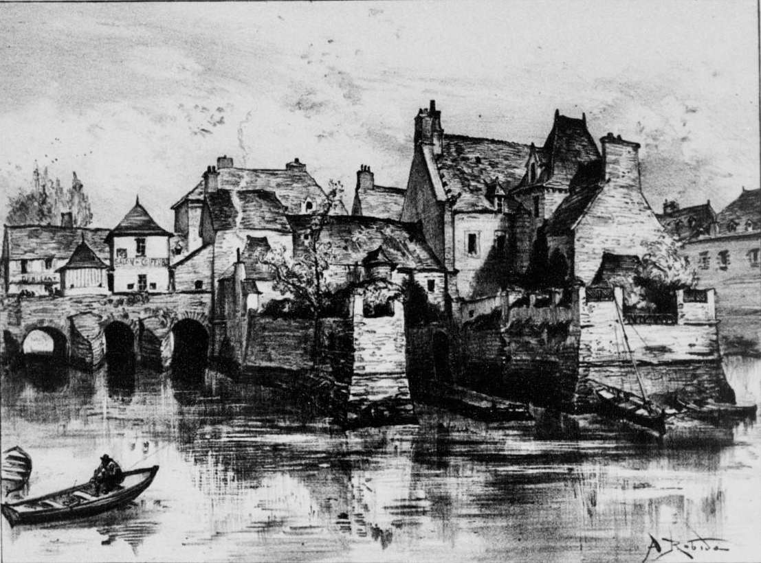 Le pont habité de Landerneau vers 1900 (lithographie d'Albert Robida publiée dans "La vieille France, Bretagne" vers 1900)